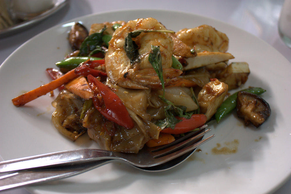 Phat Khi Mao ("drunken noodles") at Raan Jay Fai streetfood restaurant in Samran Rat, Phra Nakhon, Bangkok